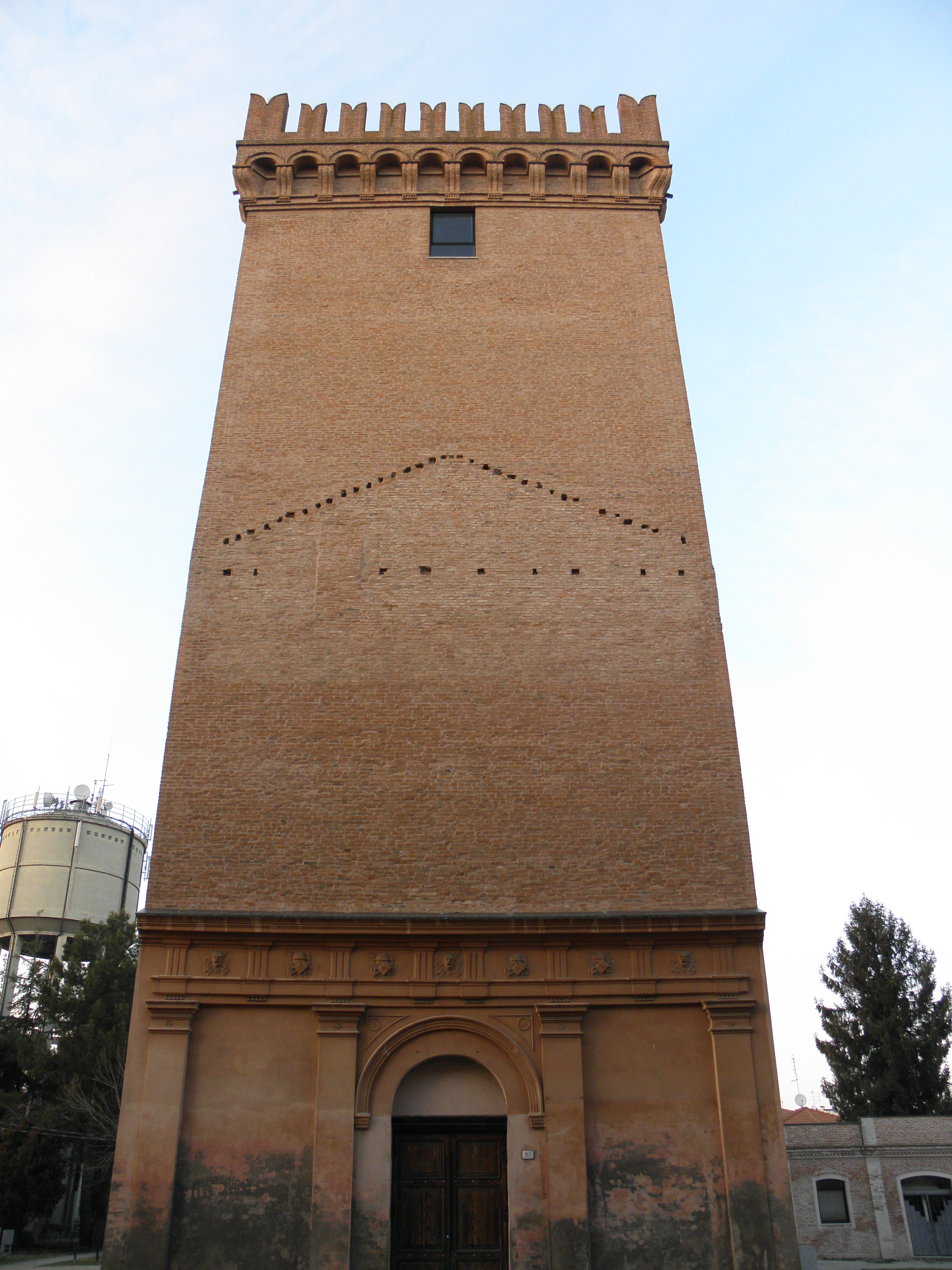 Copparo: la torre della Delizia estense.